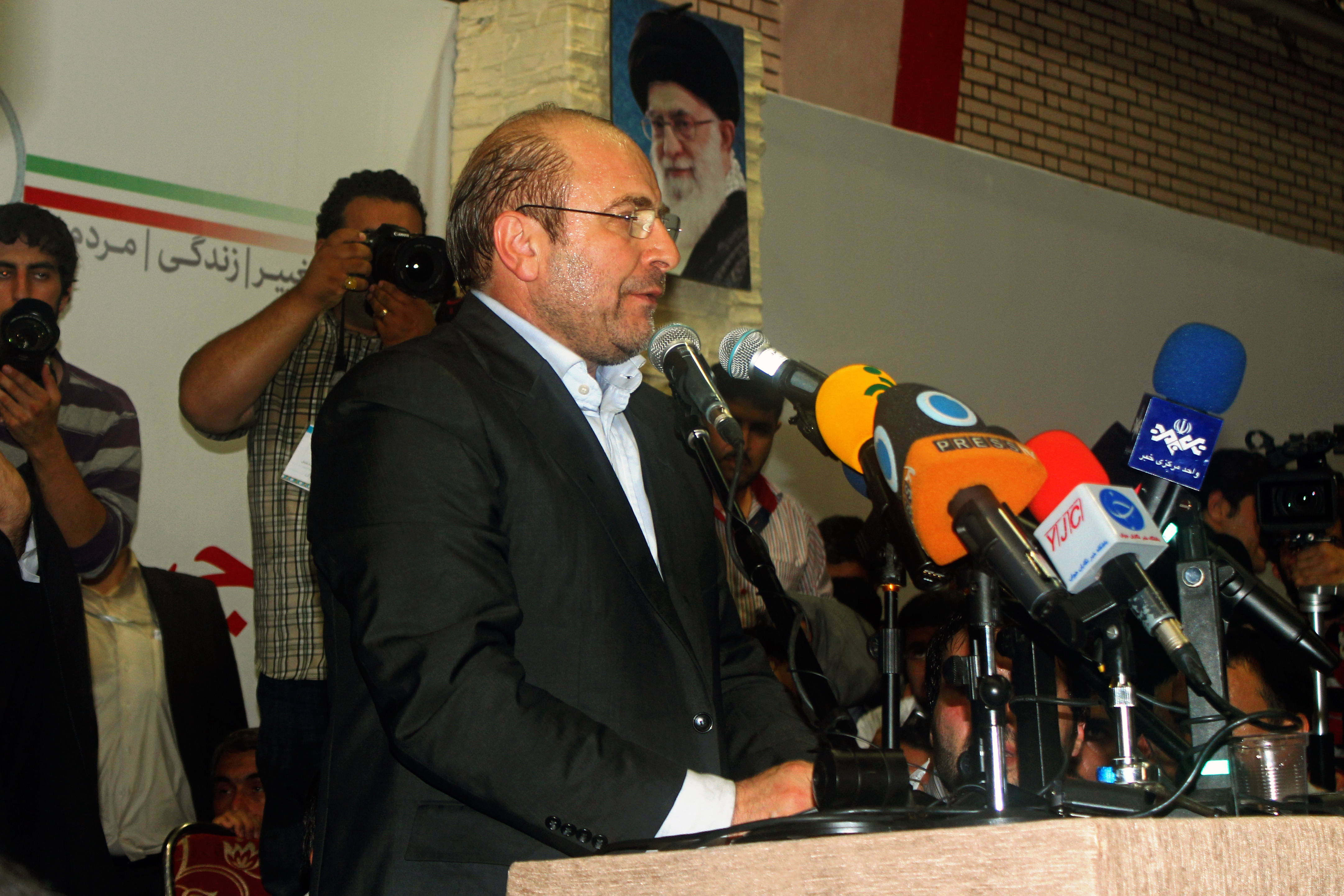 دکتر محمدباقر قالیباف در سفر انتخاباتی مشهد تاریخ ۱۹ خرداد ۱۳۹۲